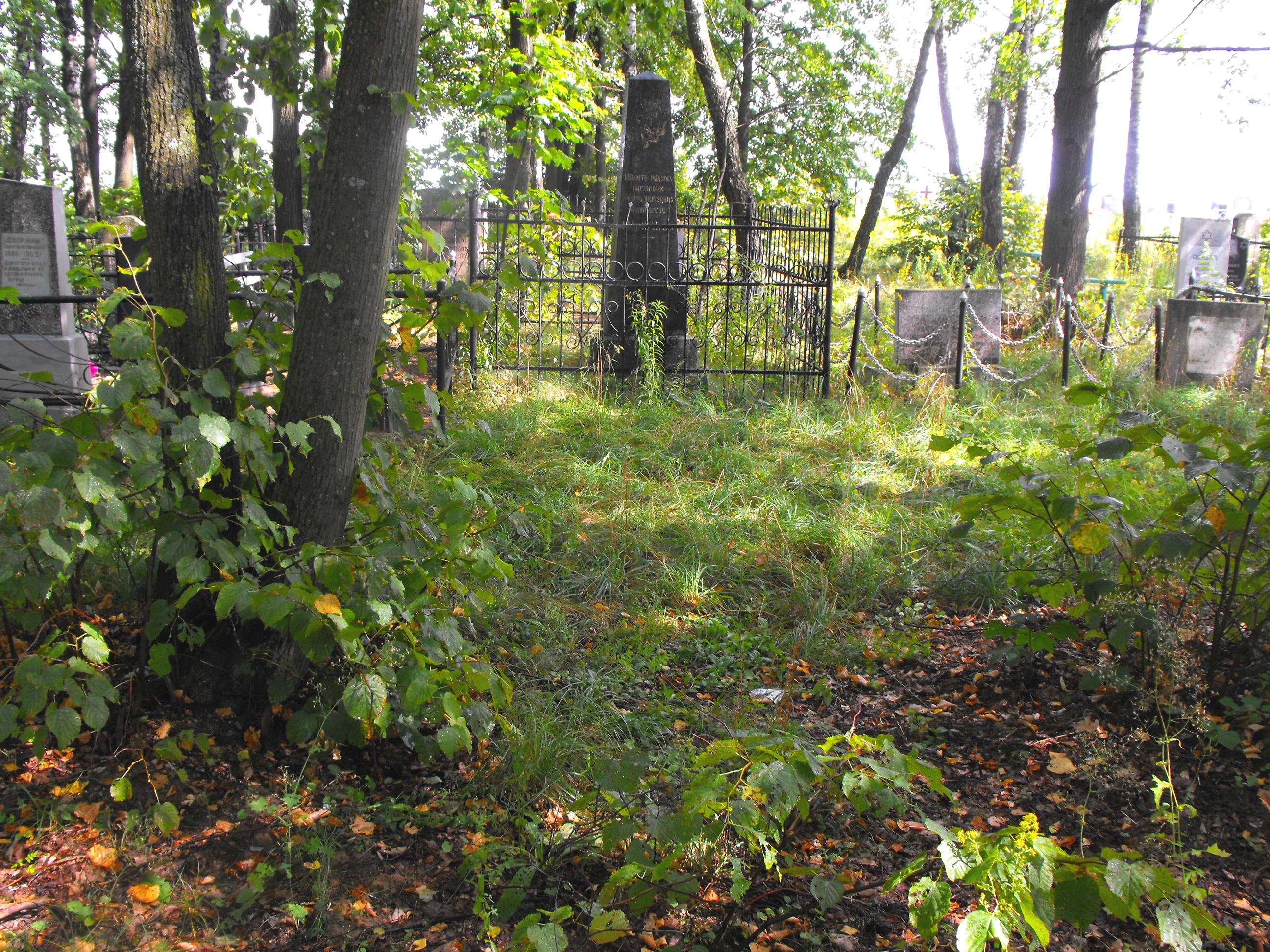 Памятник на еврейском кладбище Смолевич на месте перезахоронения части останков убитых нацистами и их пособниками осенью 1941 года евреев - узников Смолевичского гетто.